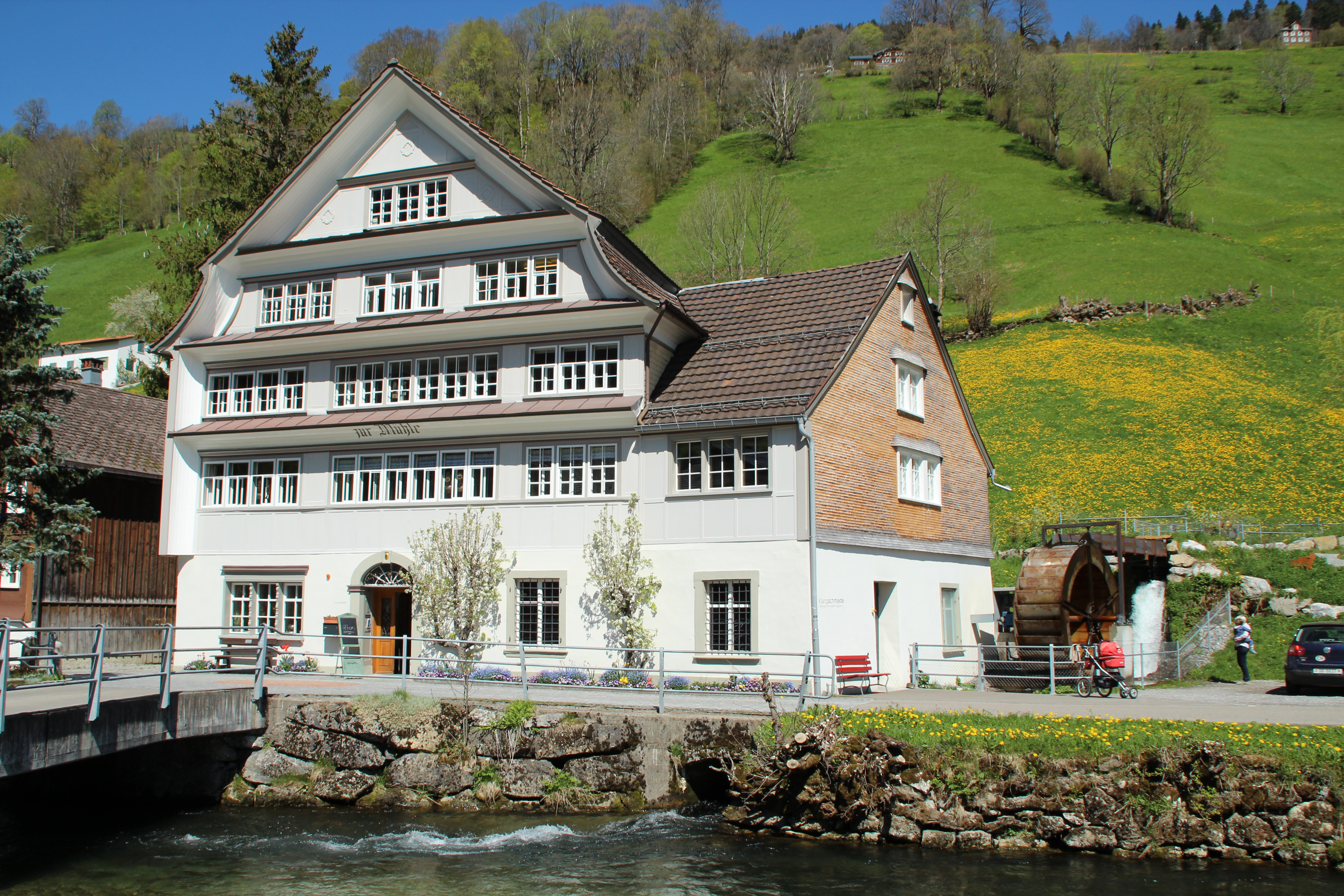 Klanghaus Alt St. Johann